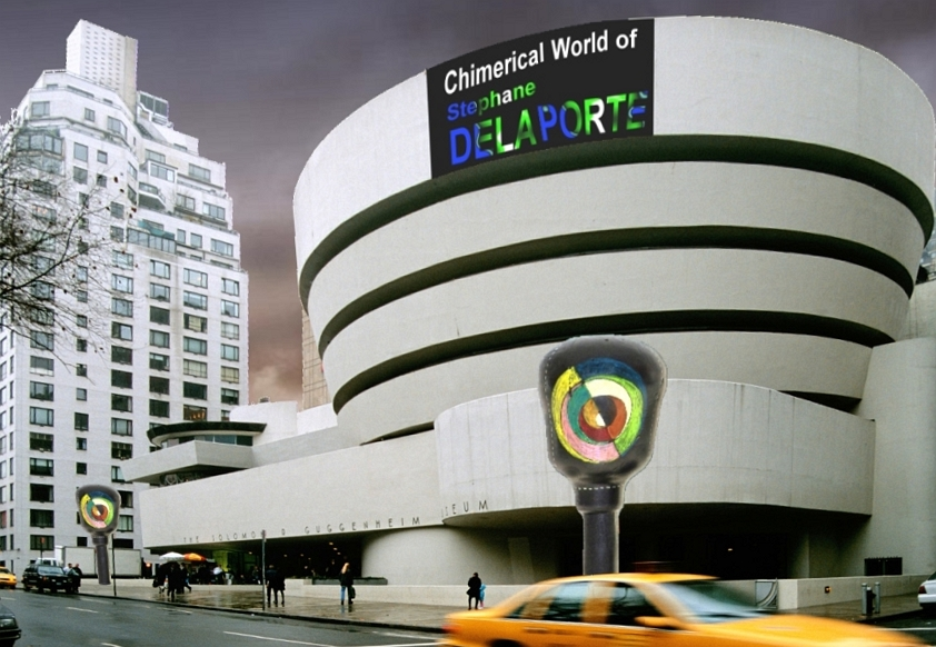 Guggenheim NY's entrance